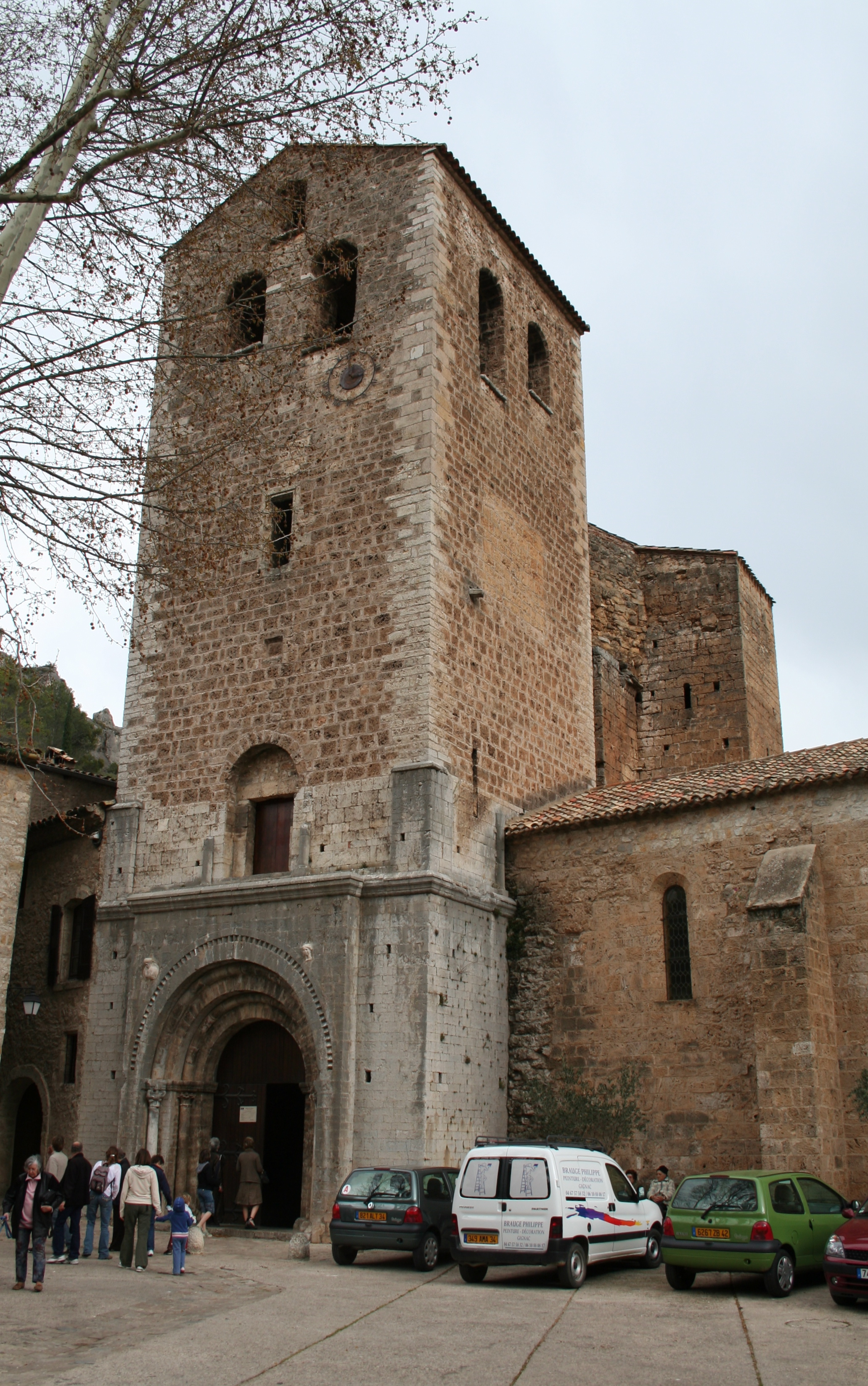 Saint-Guilhem-le-Désert (Hérault) - clocher-porche de l'église abbatiale.